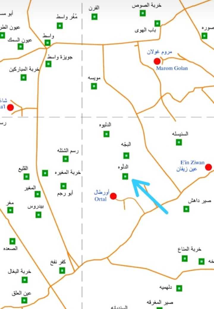 في هذه الخريطة اشير الى قرية الدلوة